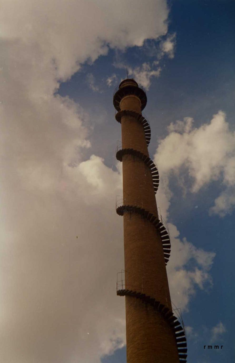 G. Bòbila Almirall